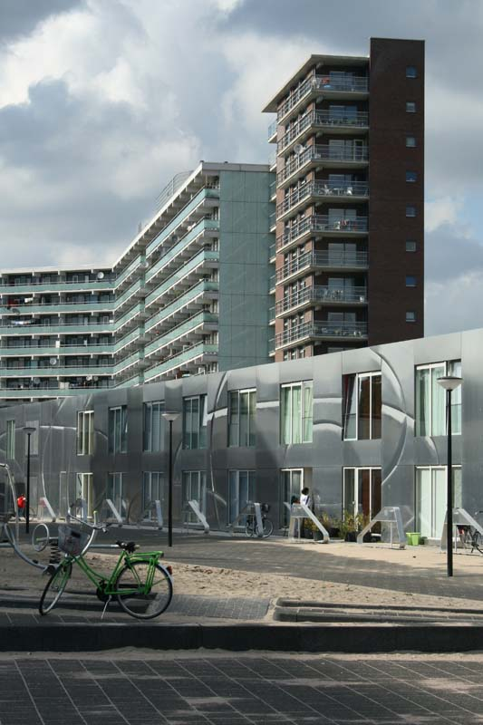 Gerenoveerde Bijlmerflat 'Florijn' met toegevoegde woontoren en laagbouw